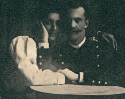 fotografia di vittorio emanuele III con la Regina Elena del Montenegro